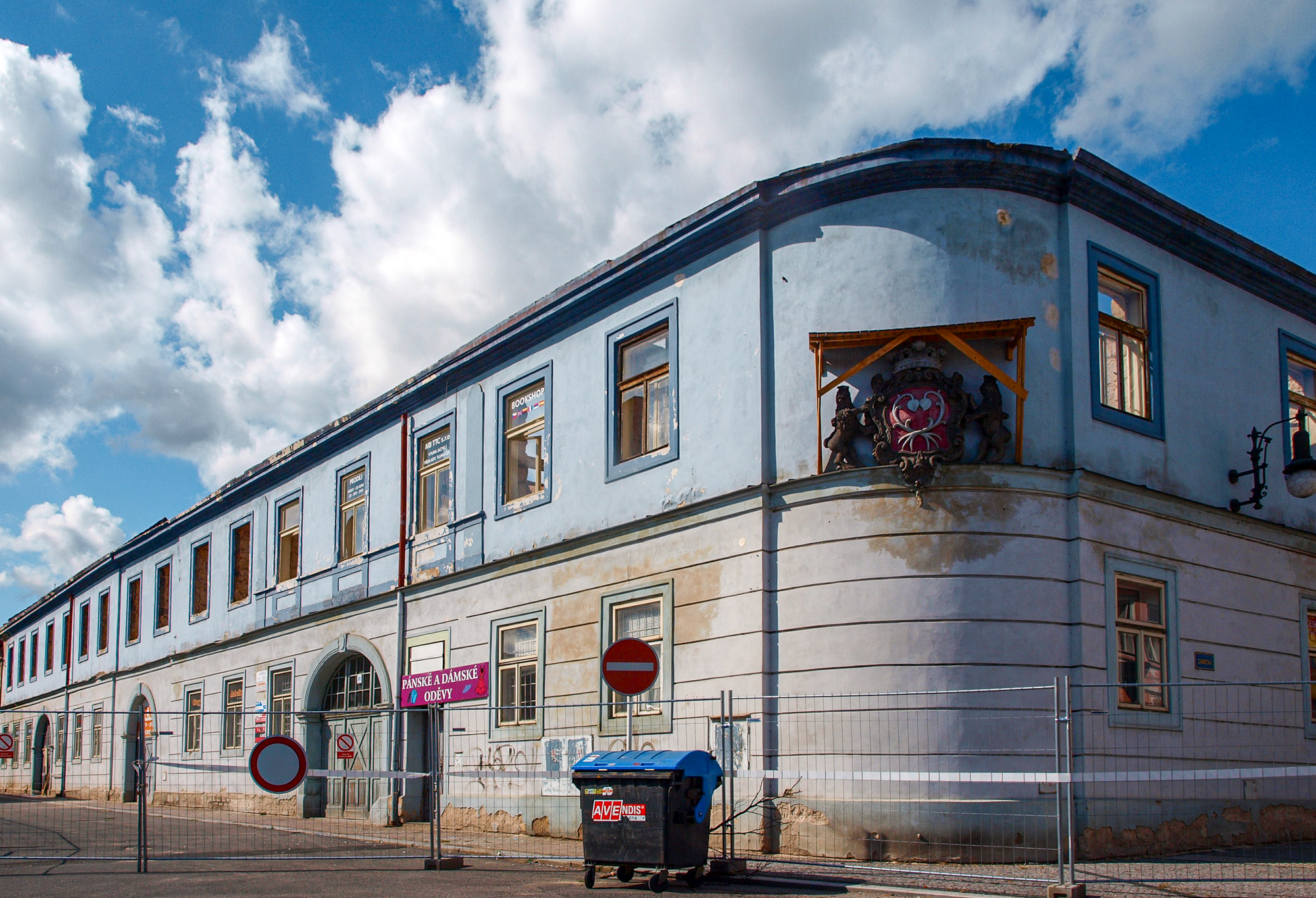 Česká Lípa